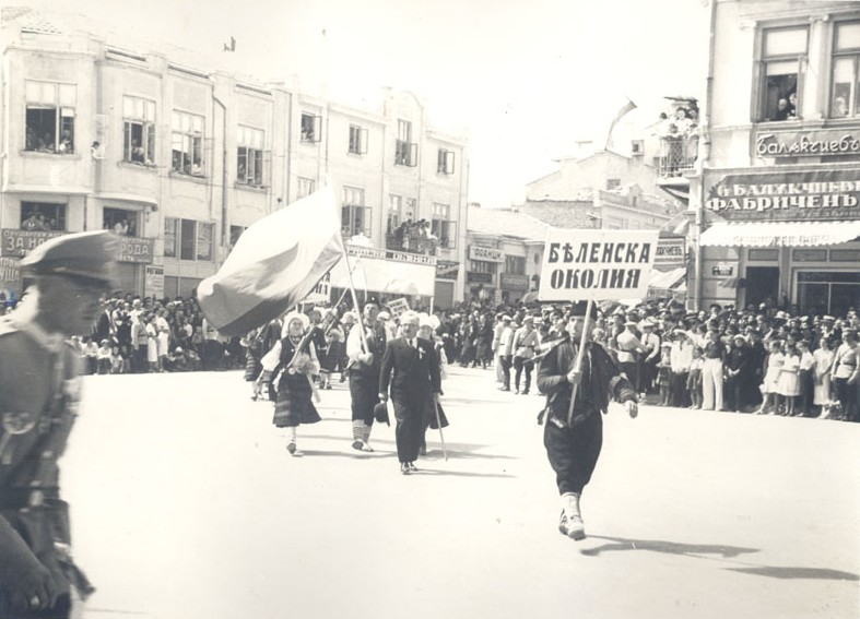 4-ти селскостопански културен и национален събор, 28 - 29 август 1938 г., гр. Варна. Парад на участниците в събора по ул. Княз Борис І. На преден план са представителите на Беленска околия.